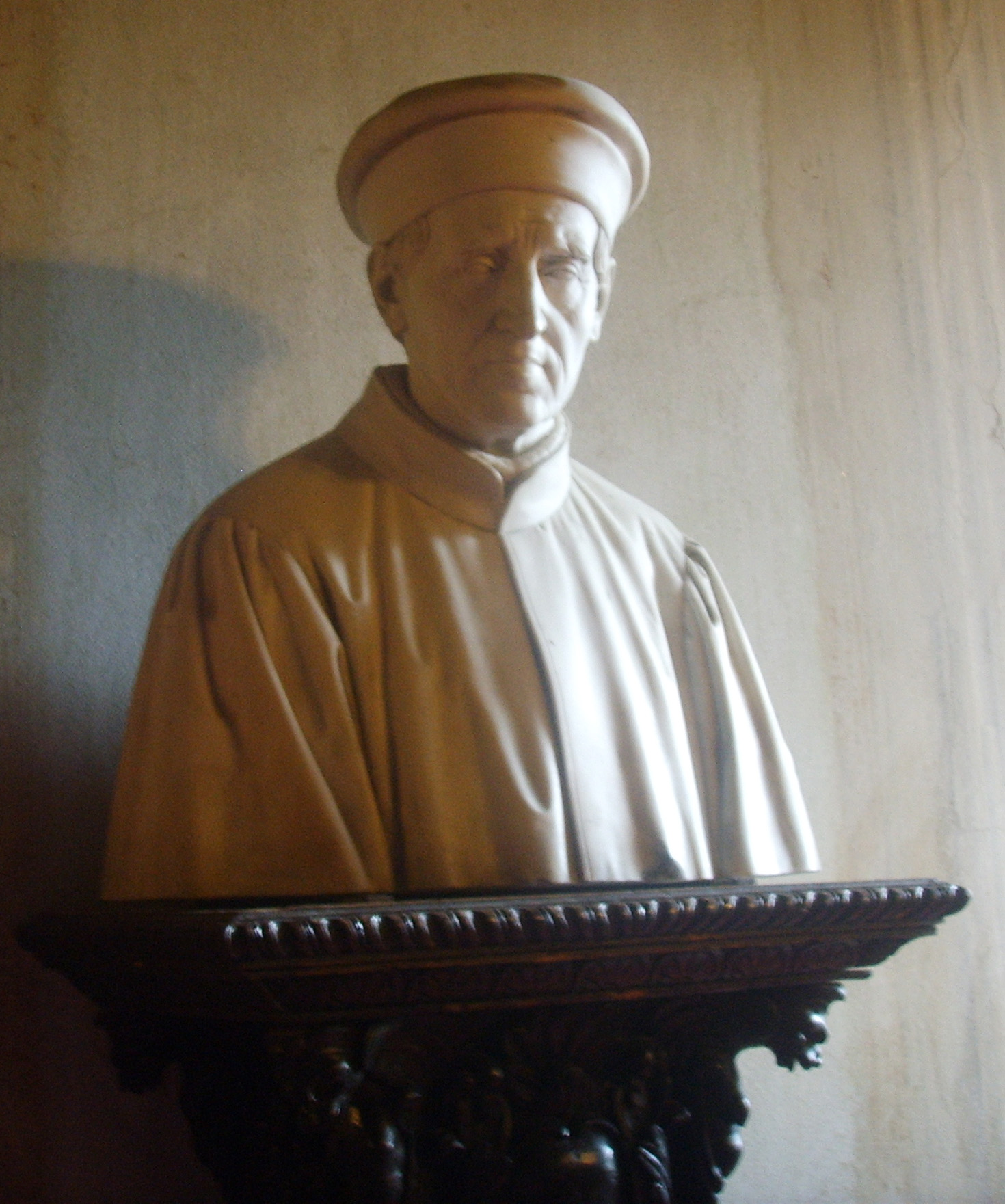 Villa di Careggi, sala del camino, busto di Cosimo il vecchio de' Medici. in Florence, Italy